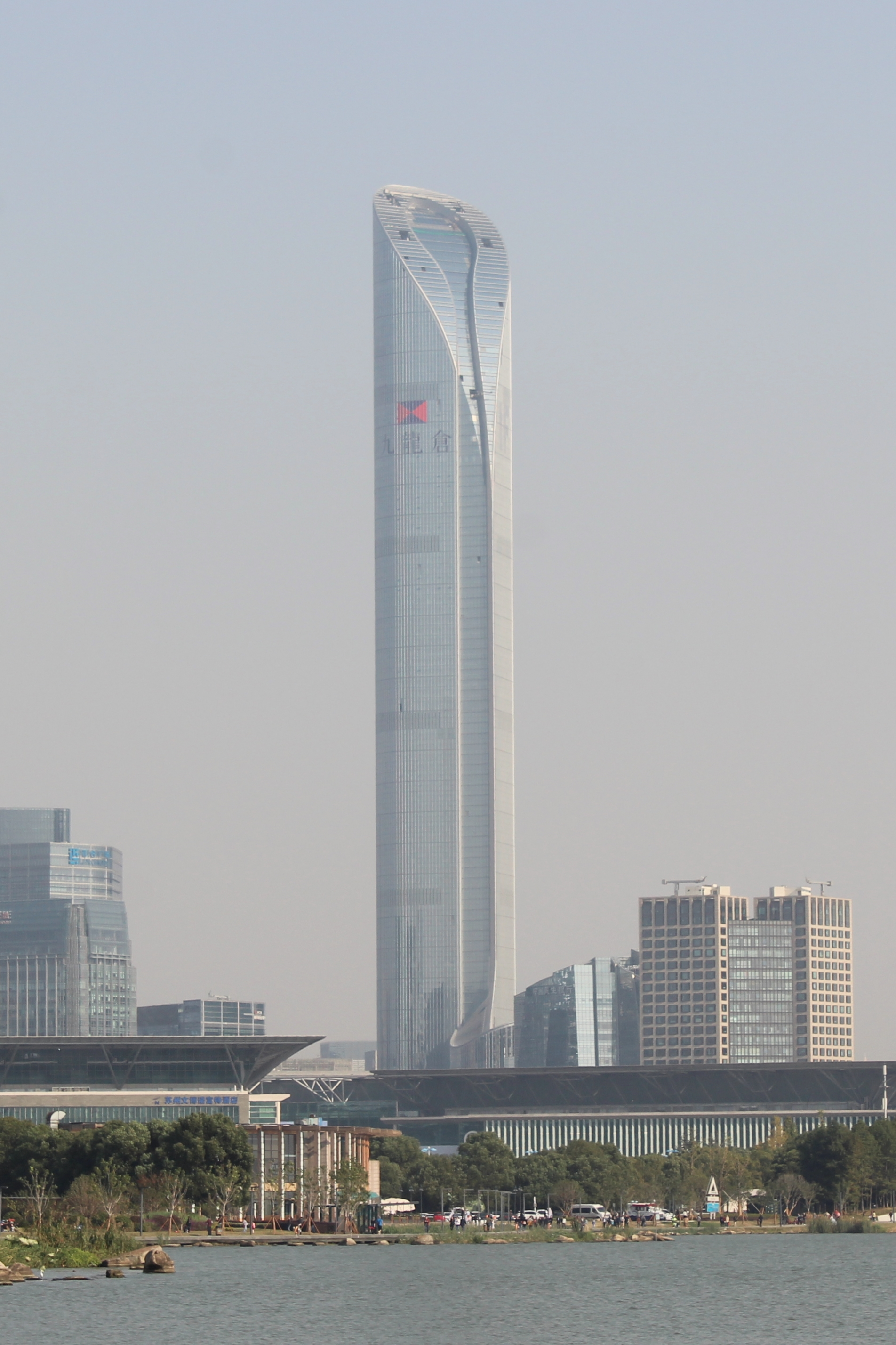 Suzhou International Financial Square (IFC), le 27 octobre 2018 Province de Jiangsu, Chine